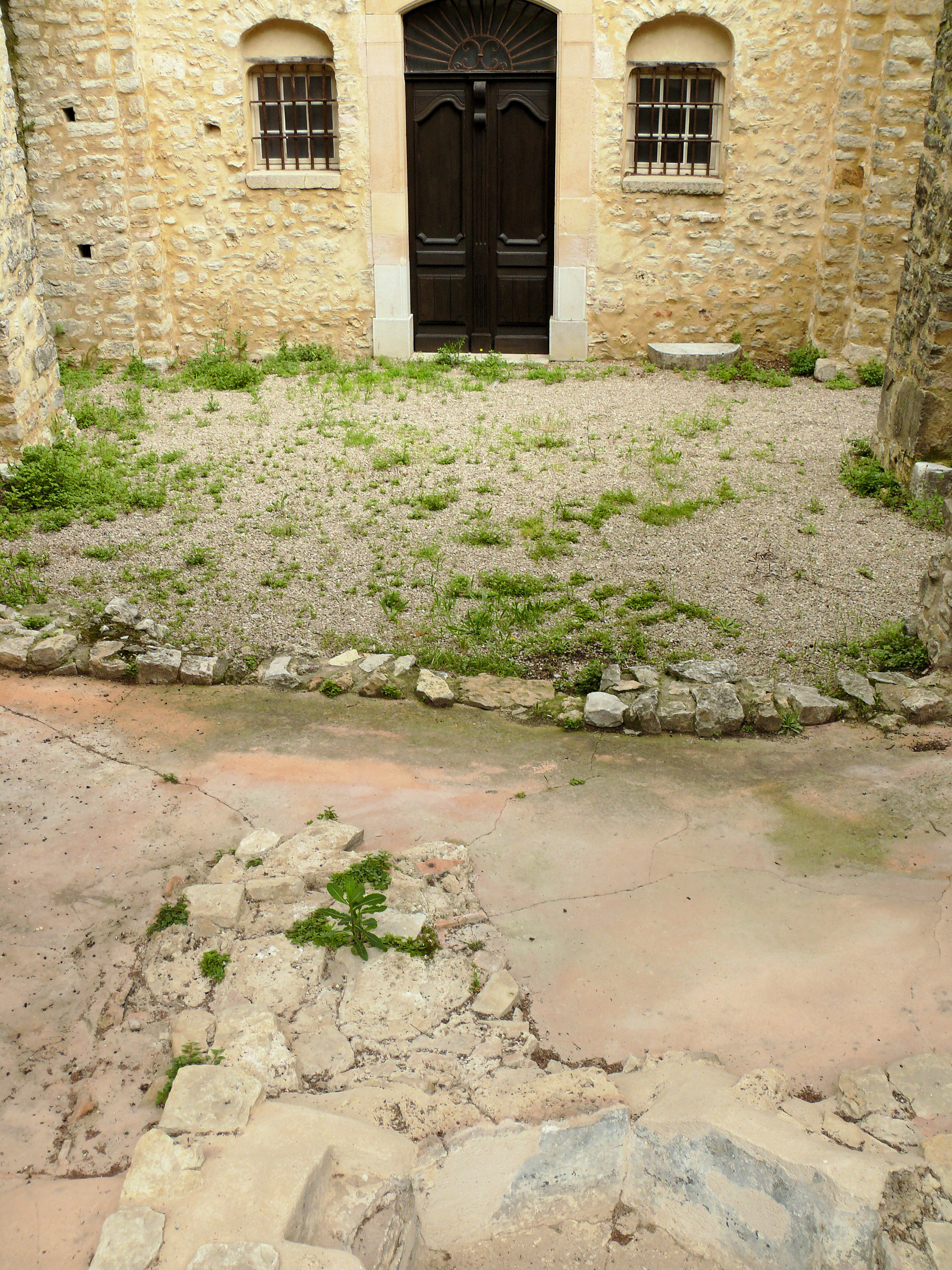 Église Notre-Dame-du-Brusc - Cuve baptismale sous le porche .